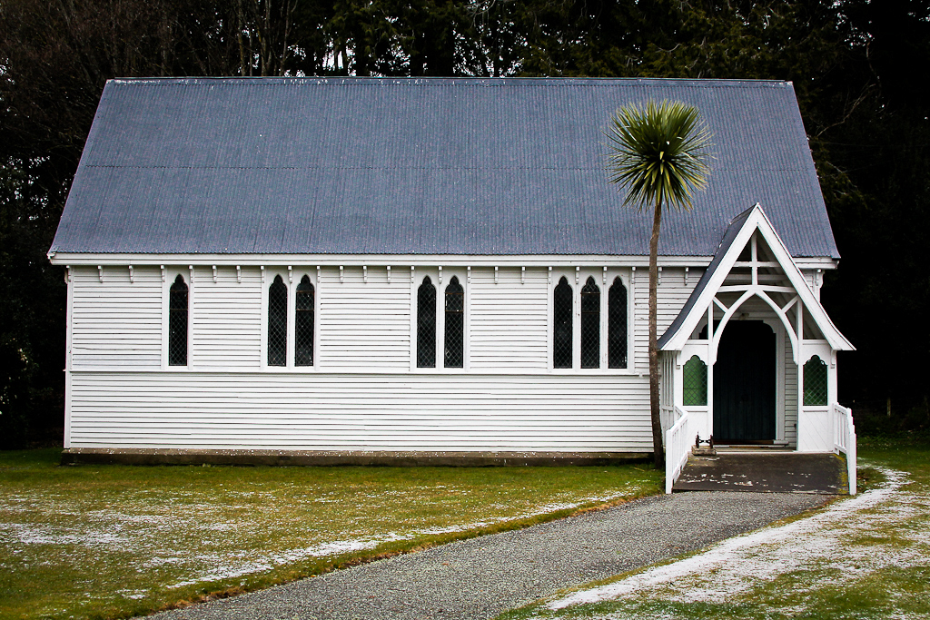 St. Peters Church in Springfield, New Zealand.